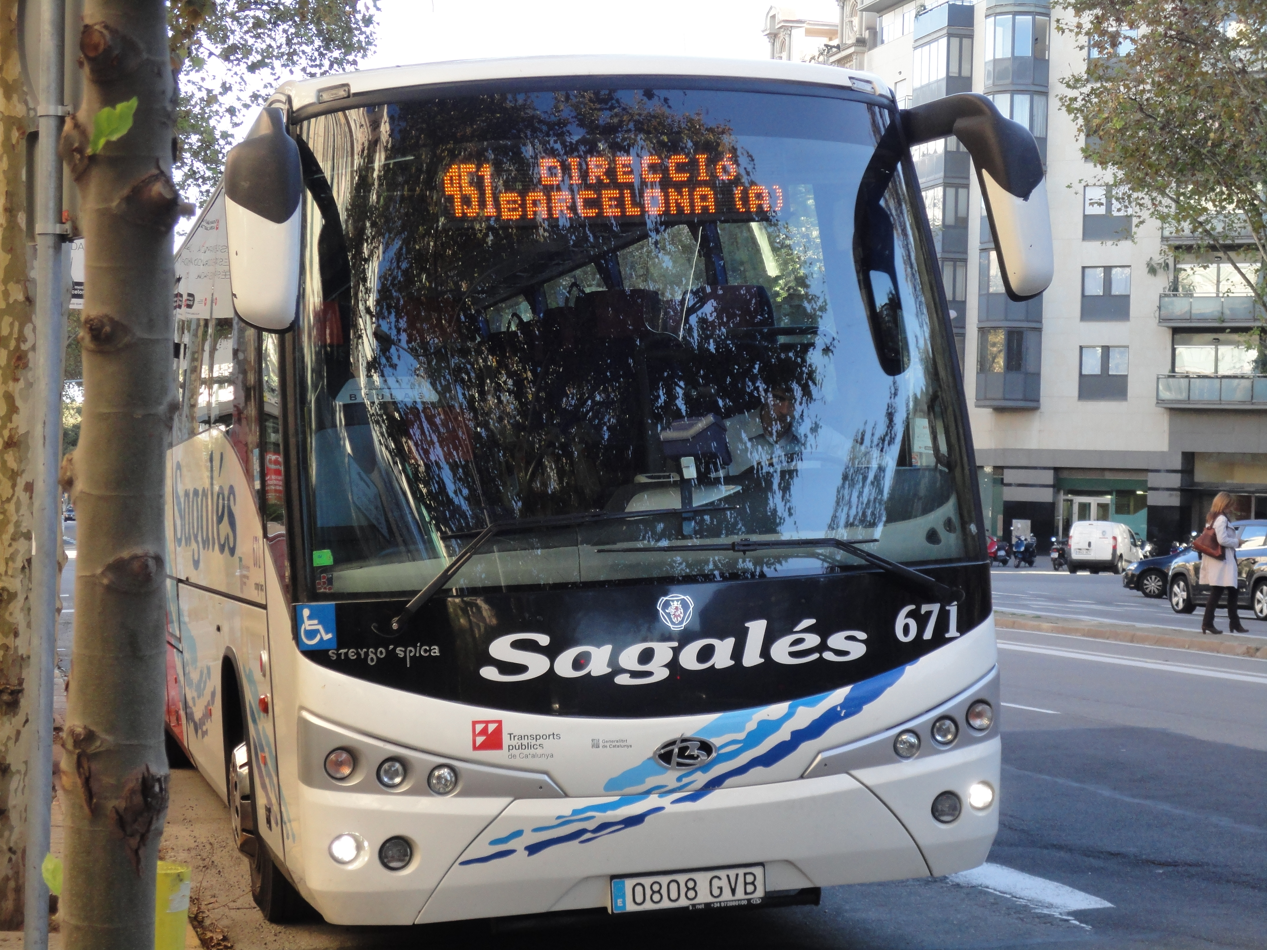 Autobús interurbà al Pg. Sant Joan (Barcelona).